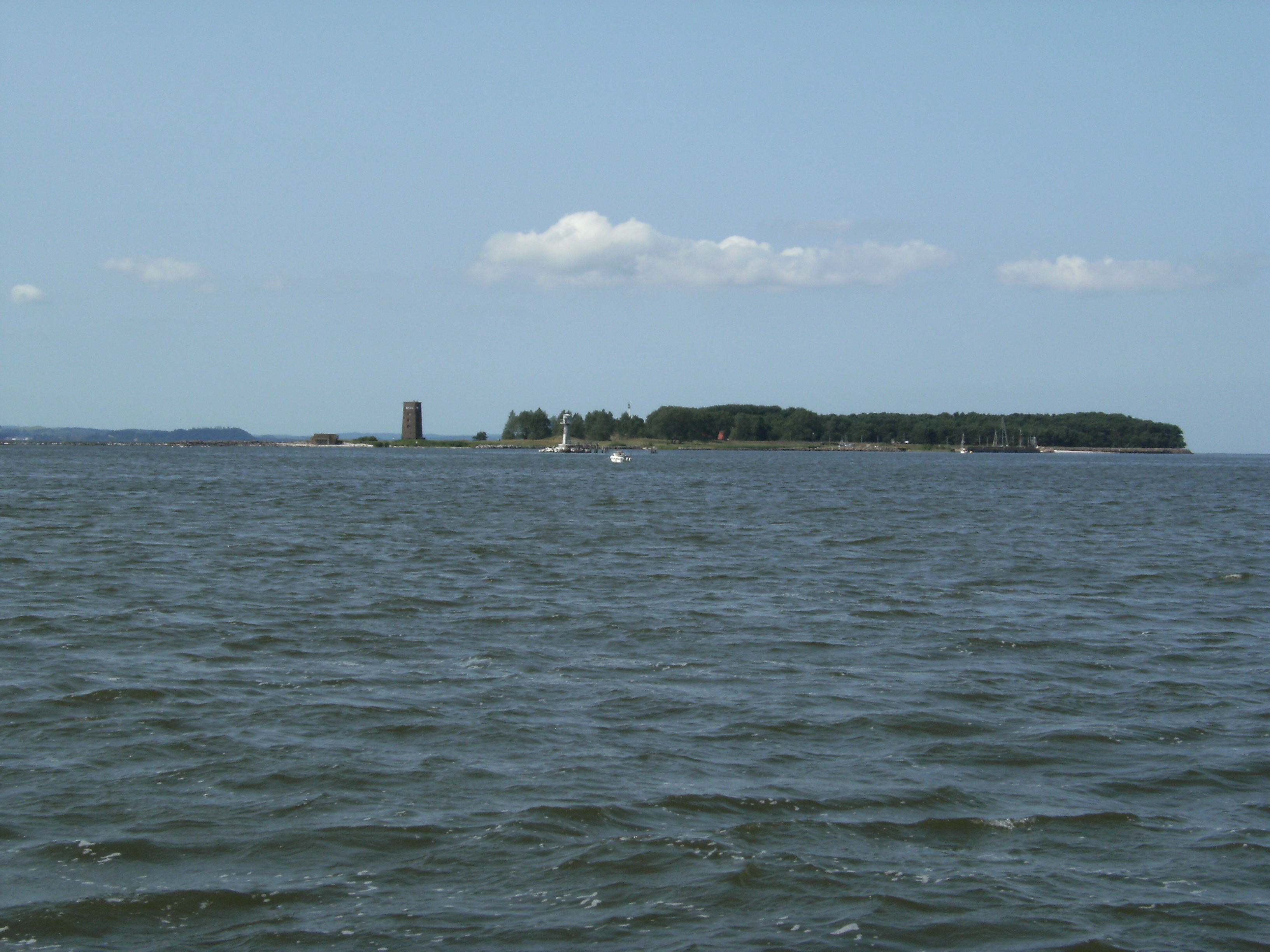 Insel Ruden von Südost